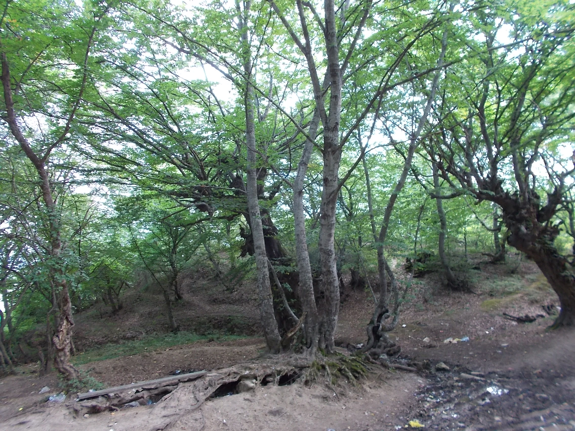 Источник священный (Республика Дагестан, Дагестанские Огни, село Дарваг, 2 км к юго-западу от села)